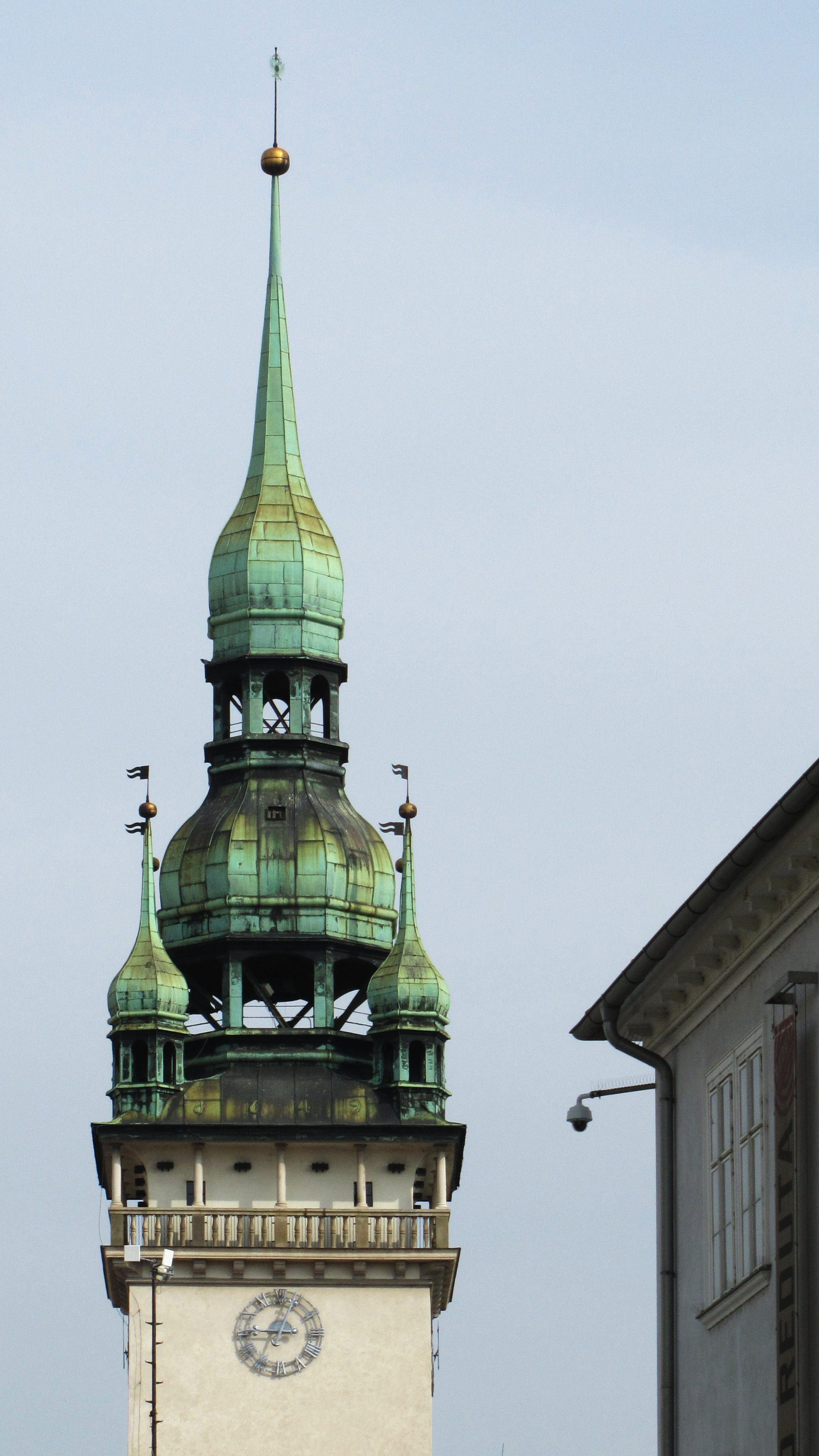 Pohled na věž Staré radnice v Brně z Kapucínského náměstí